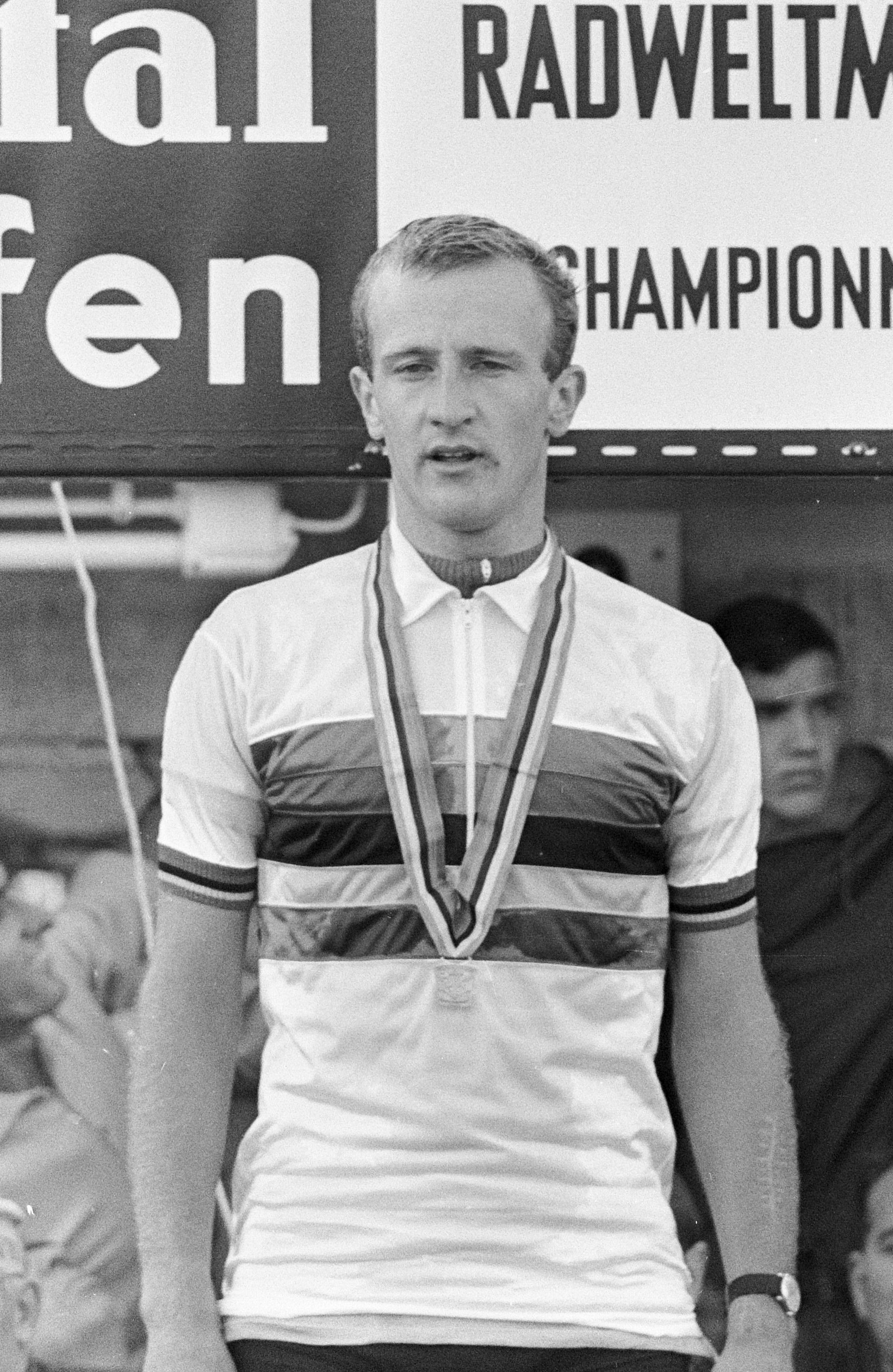 Wereldkampioenschappen Wielrennen op Nurburgring 1966, Dolman op podium